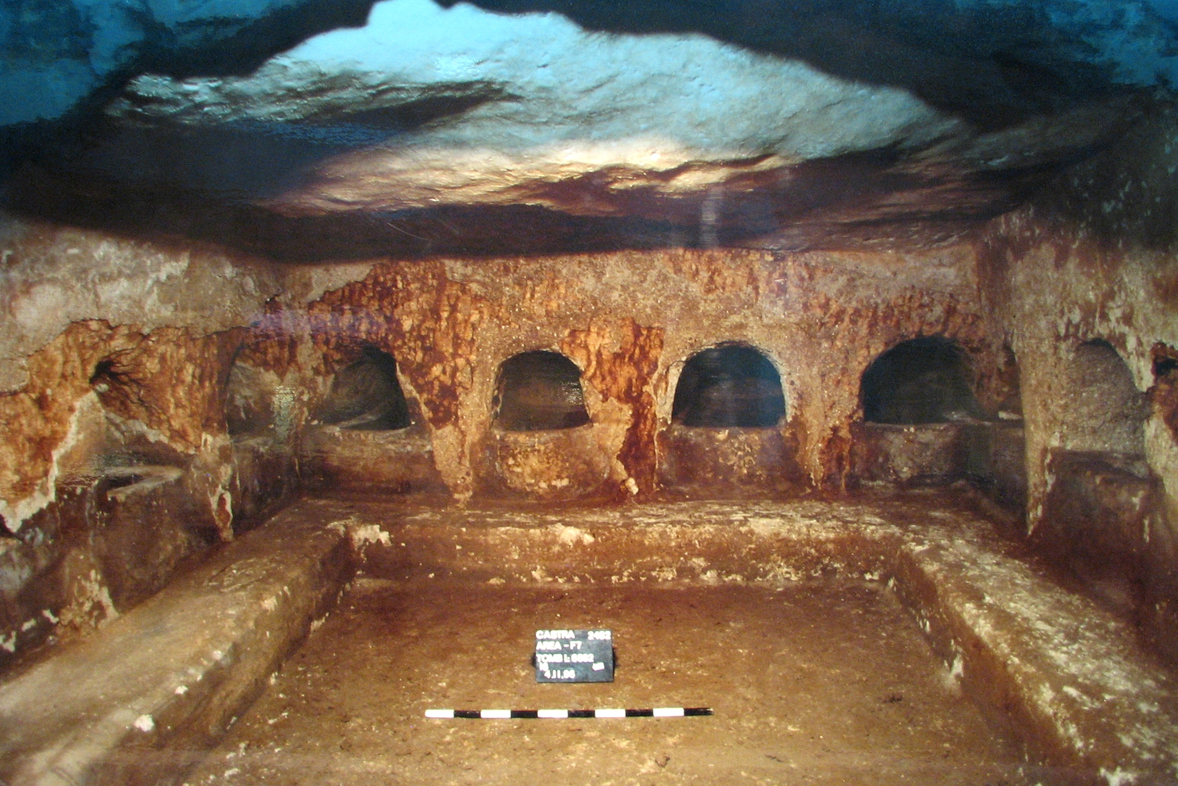 Findings from Hirbet Casra - In Castra Museum, Haifa Israel ממצאים צהאתר הארכאולוגי חירבת קסטרא, היום נמצאים במוזיאון קסטרא העתיקה הנמצא בקניון קסטרא בחיפה צילום של אולם קבורה מס' 16 צולם במקור על ידי סנדי מנדואה, מוצג במוזיאון